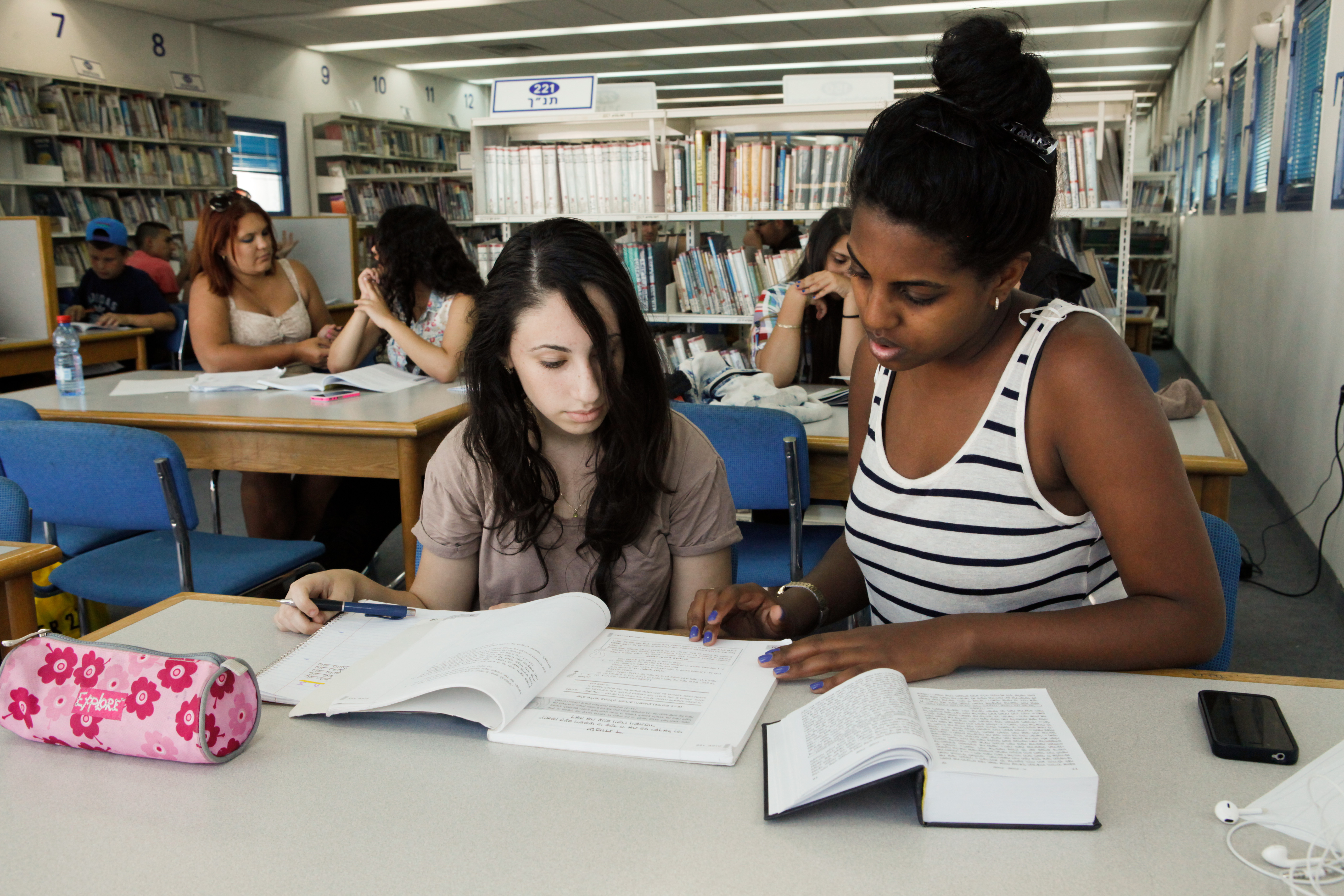 פרויקטים. סטודנטית במהלך פעילות חונכות צילום אמנון גוטמן.